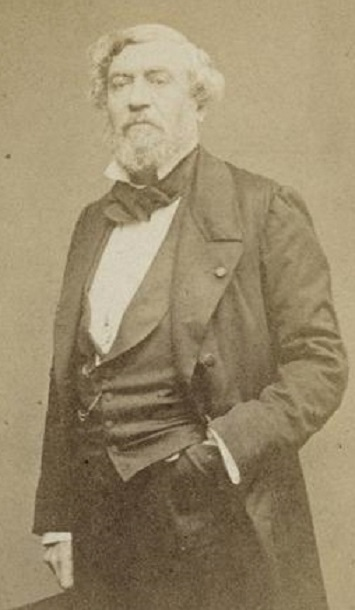 Etinne Carjat : Portrait du peintre Théodore Gudin (vers 1865, musée d'Orsay)